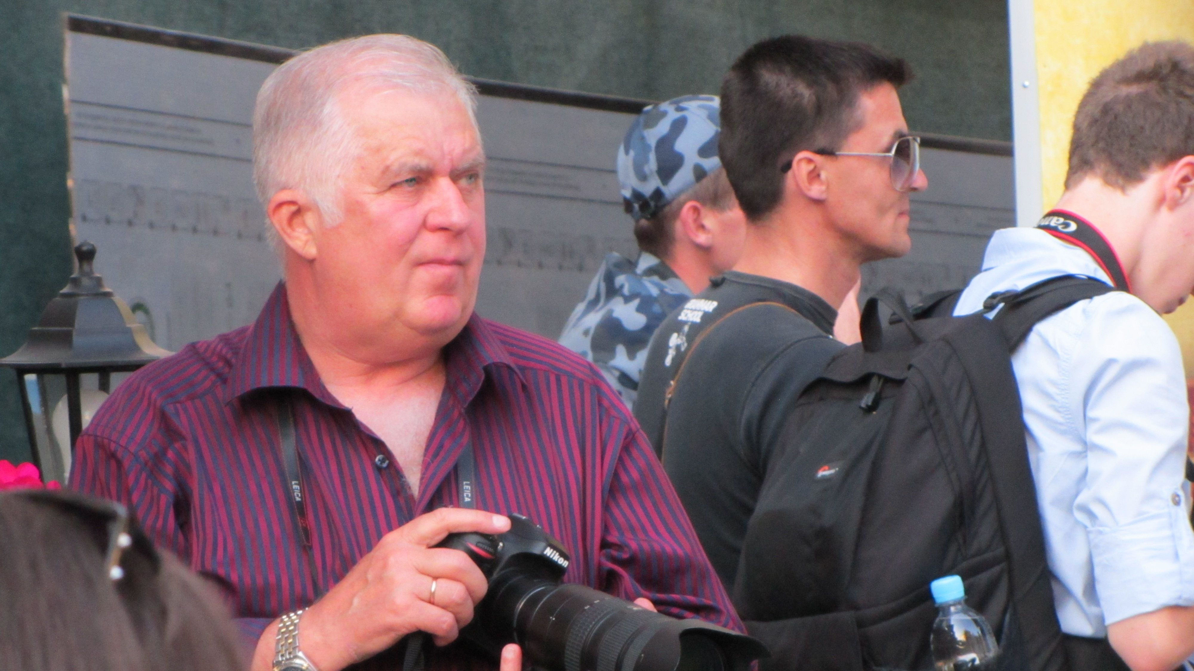 Пилип'юк Василь Васильович - український фотомайстер, фотографує на третьому міжнародному джазовому фестивалі Alfa Jazz Fest, Львів, площа Ринок